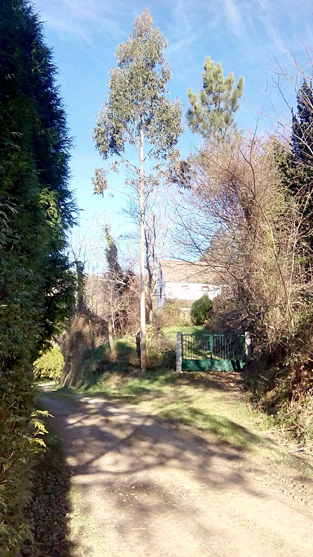 Vista de Figueiras, Sedes.